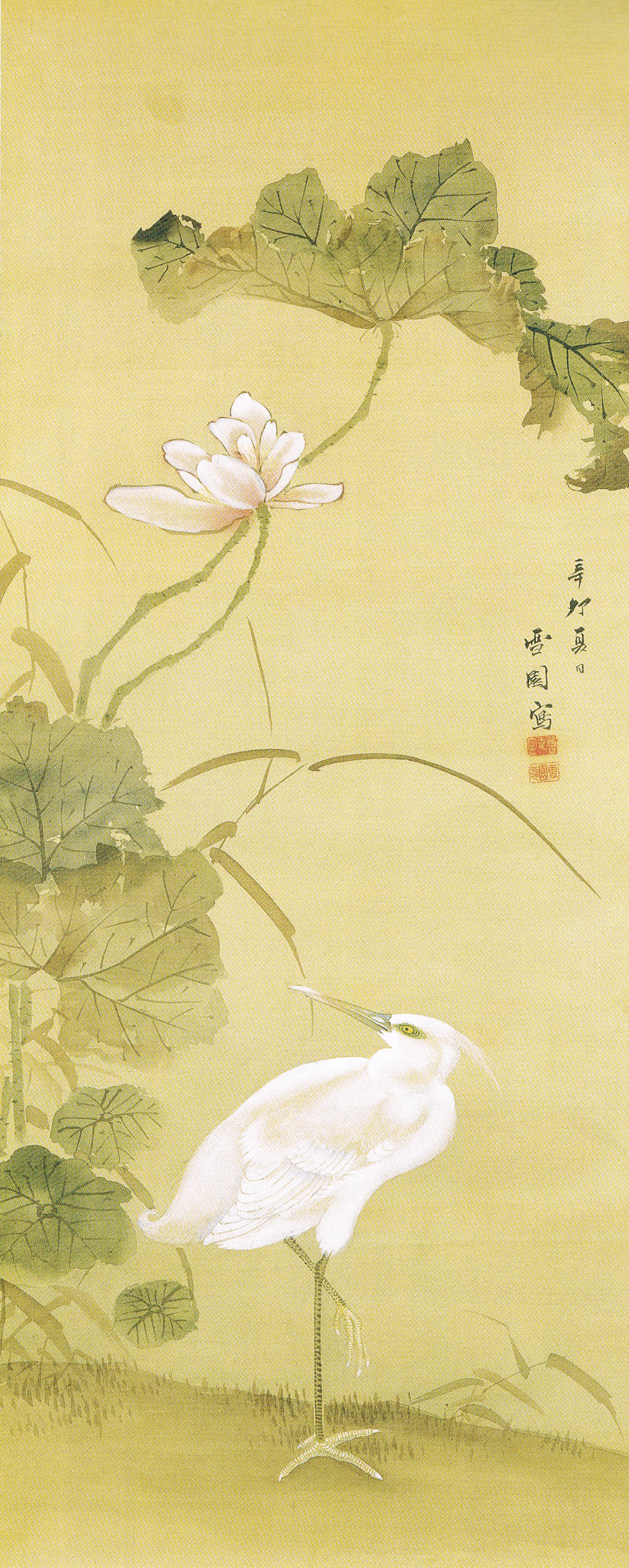 増山雪園筆 蓮華鷺図 天保2年(1831年) 桑名市博物館